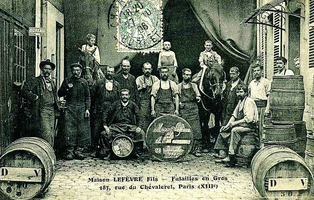 Maison Lefèvre Fils - Futailles en Gros. 183, rue du Chevaleret, Paris (XIIIe). Inscription sur un fond de tonneau: Maison Lefèvre fils et ses ouvriers, 27 septembre 1905. Carte postale, oblitérée 27 octobre 1906.Personnel et chevaux dans l'atelier d'un artisan tonnelier établi dans le XIIIe arrondissement de Paris, non loin du pont de Bercy, emplacement favorable pour gagner la rive droite de la Seine et les chais du marché des vins et spiritueux des entrepôts de Bercy.